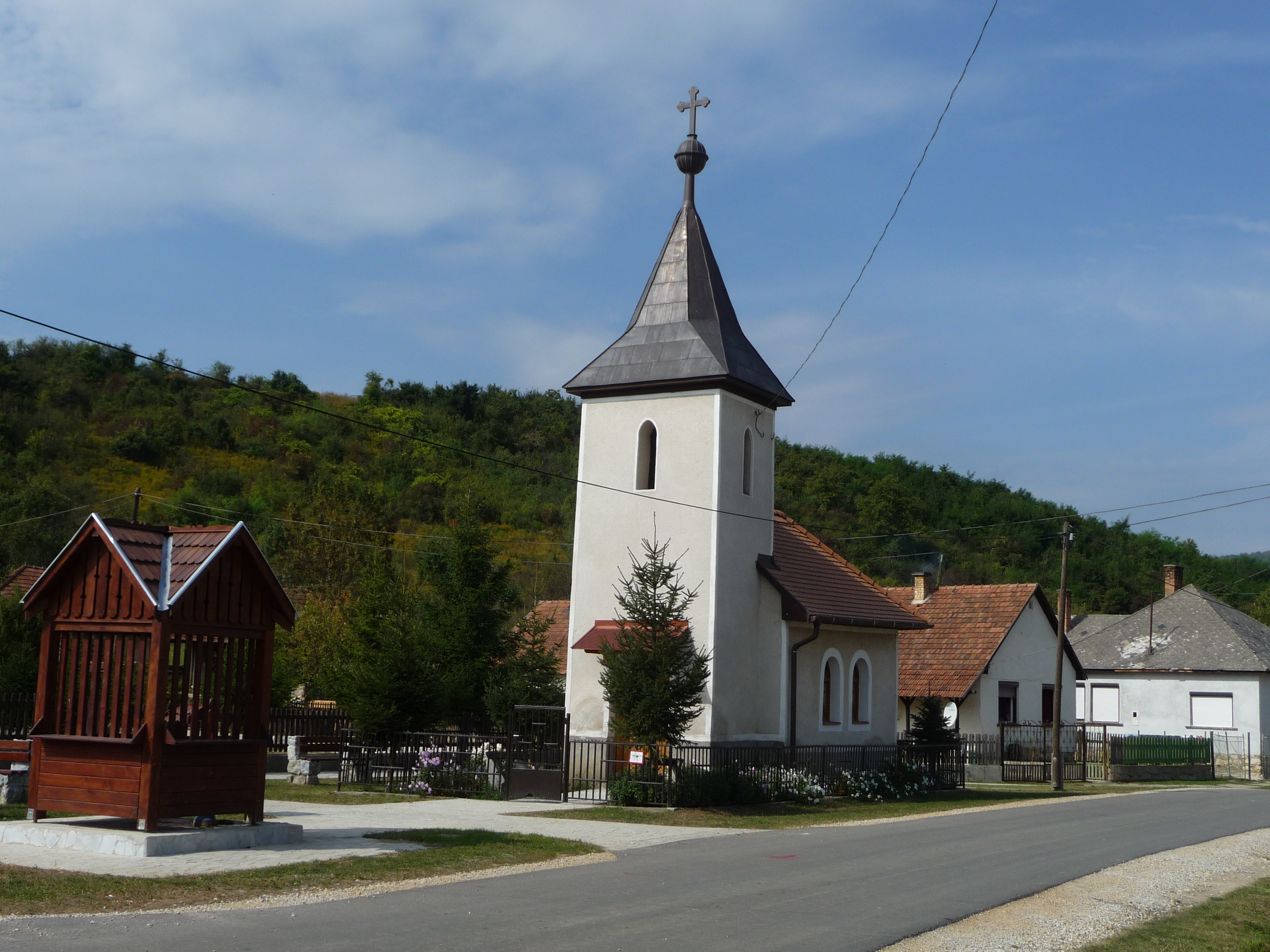 Bódvalenkei katolikus templom